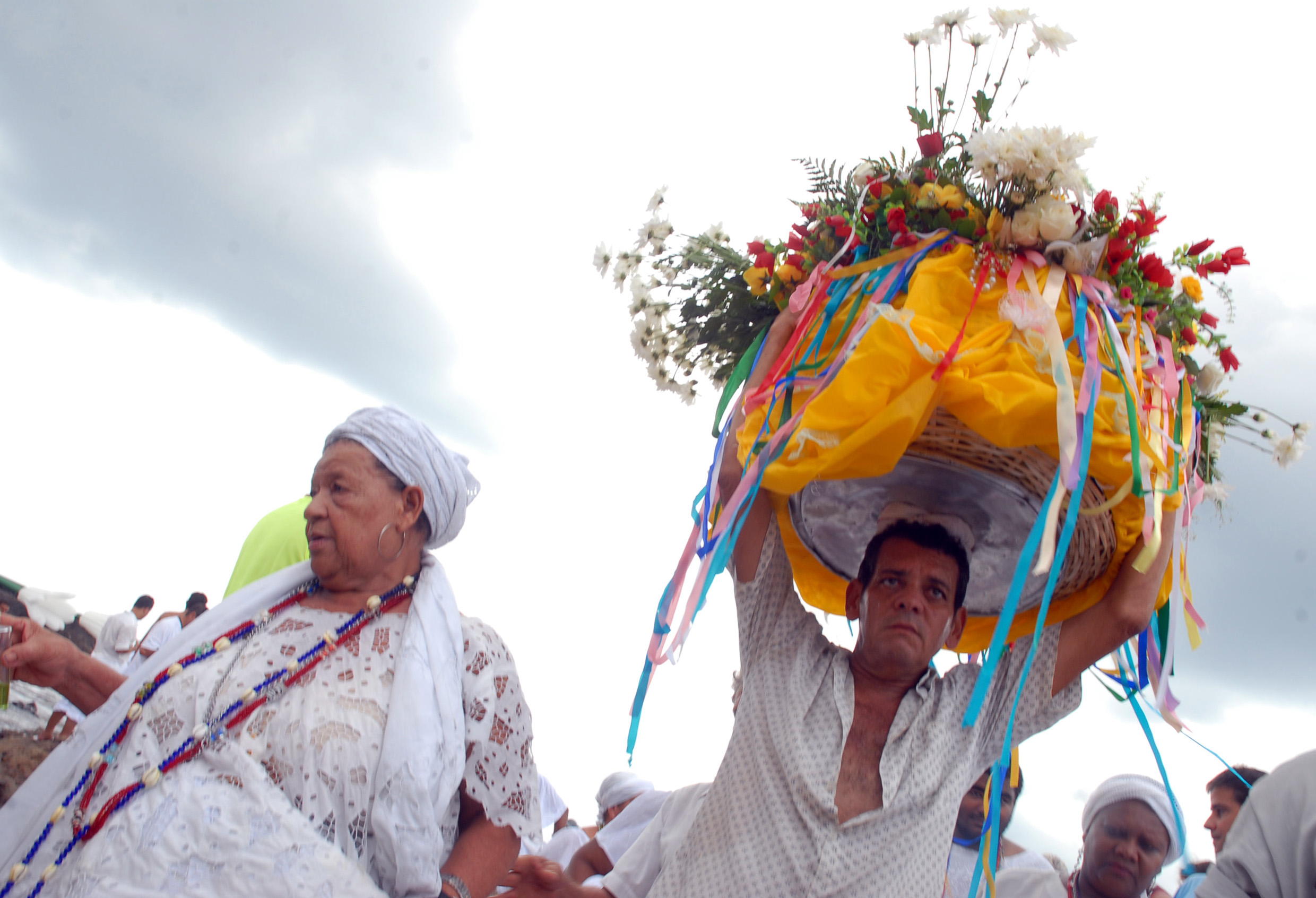 Presente de Iemanjá na Praia do Rio Vermelho, Salvador, Bahia, Brazil